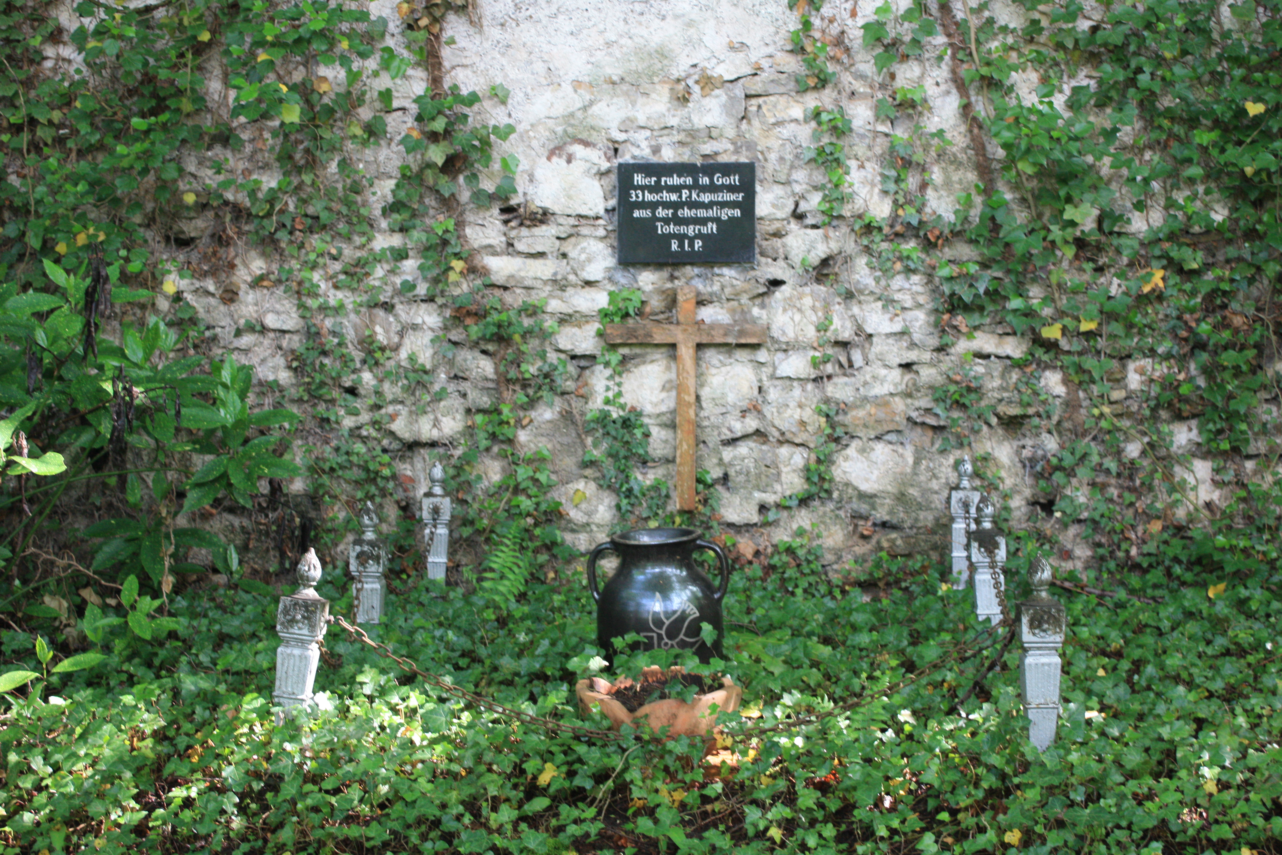 Kapuzinergrab an der Südmauer der Klostermatte Laufenburg. Text der Tafel: "Hier ruhen in Gott / 33 hochw. P. Kapuziner / aus der ehemaligen Totengruft / R.I.P.:"